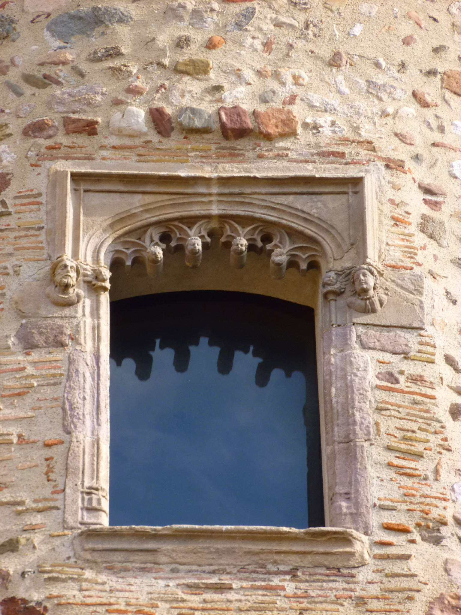 Tarrasa - Torre del Palau